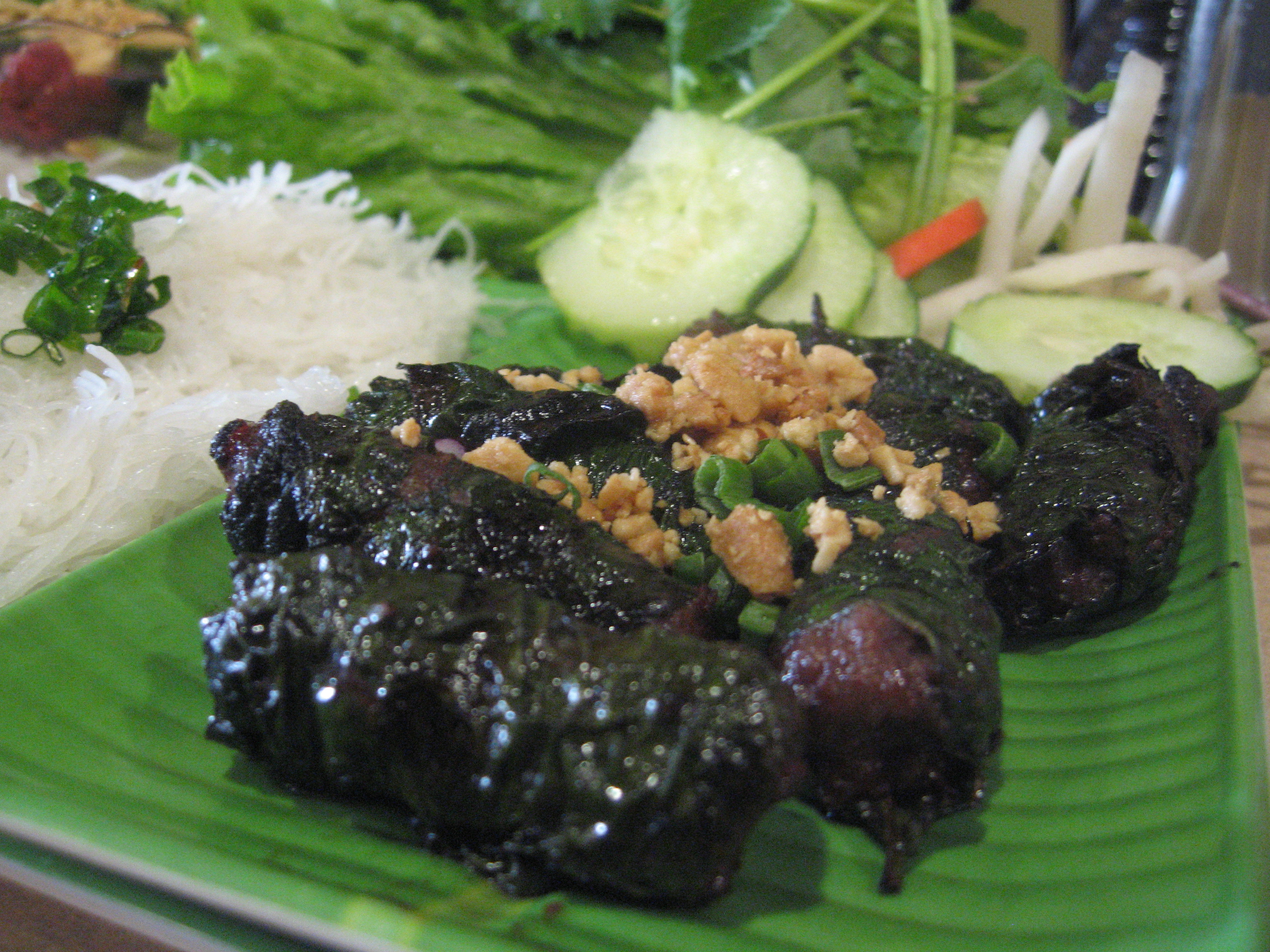 @ Banh Cuon Tan Dinh